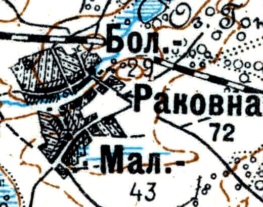 Топографическая карта Ленинградской области, квадрат Vc-29 (Батецкая), деревня Раковно